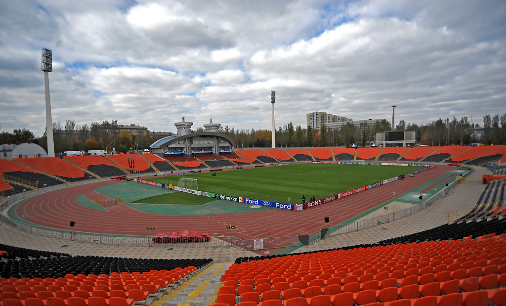 Olimpiyskiy